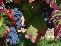 Carignan, Conservatoire du vignoble charentais, Cherves